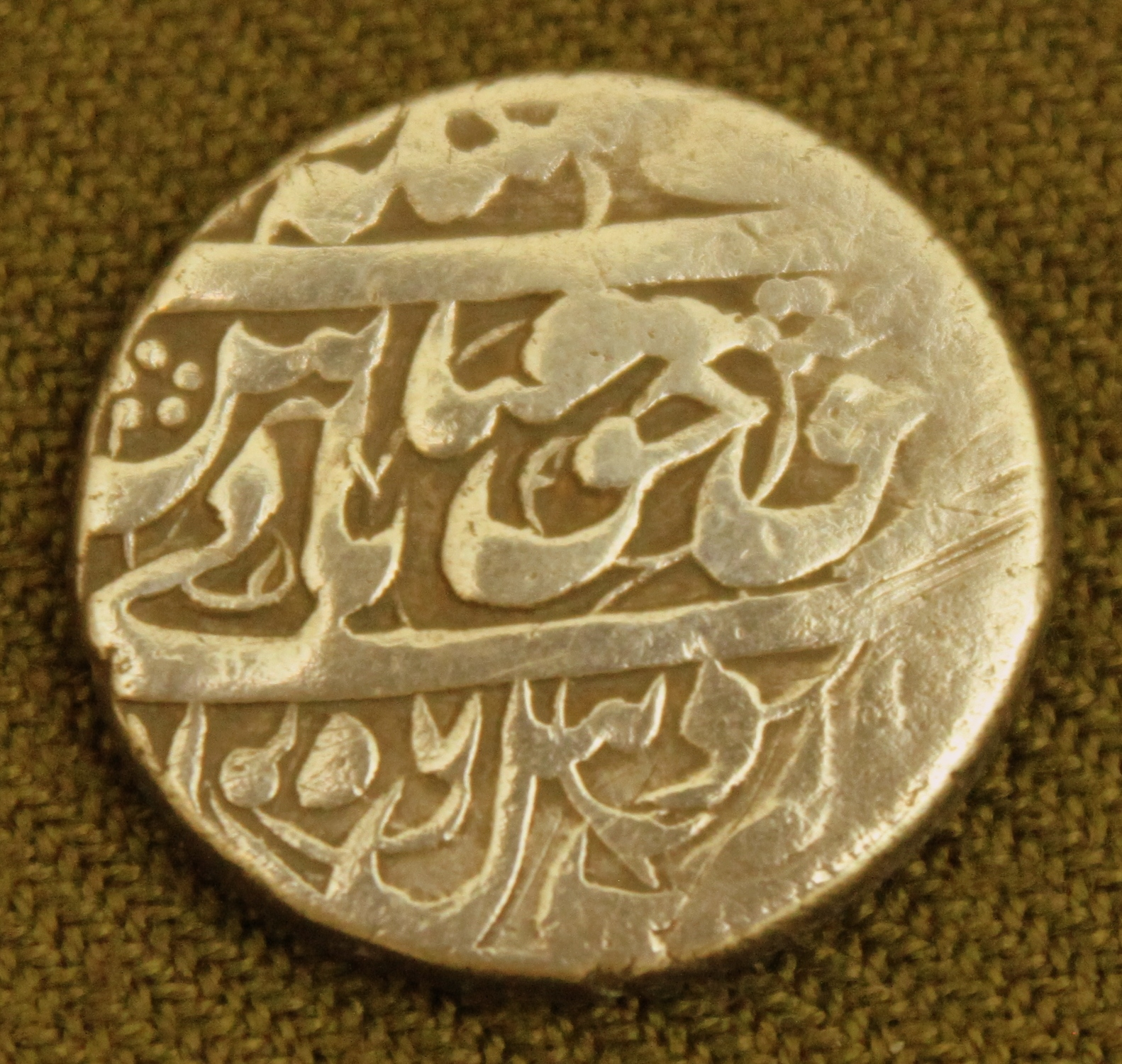 Сефевиды, шах Аббас II серебряная монета 1647 год.